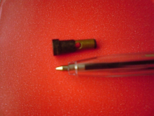 Wygląd dyszy wyjętej z zapalniczki żarowej